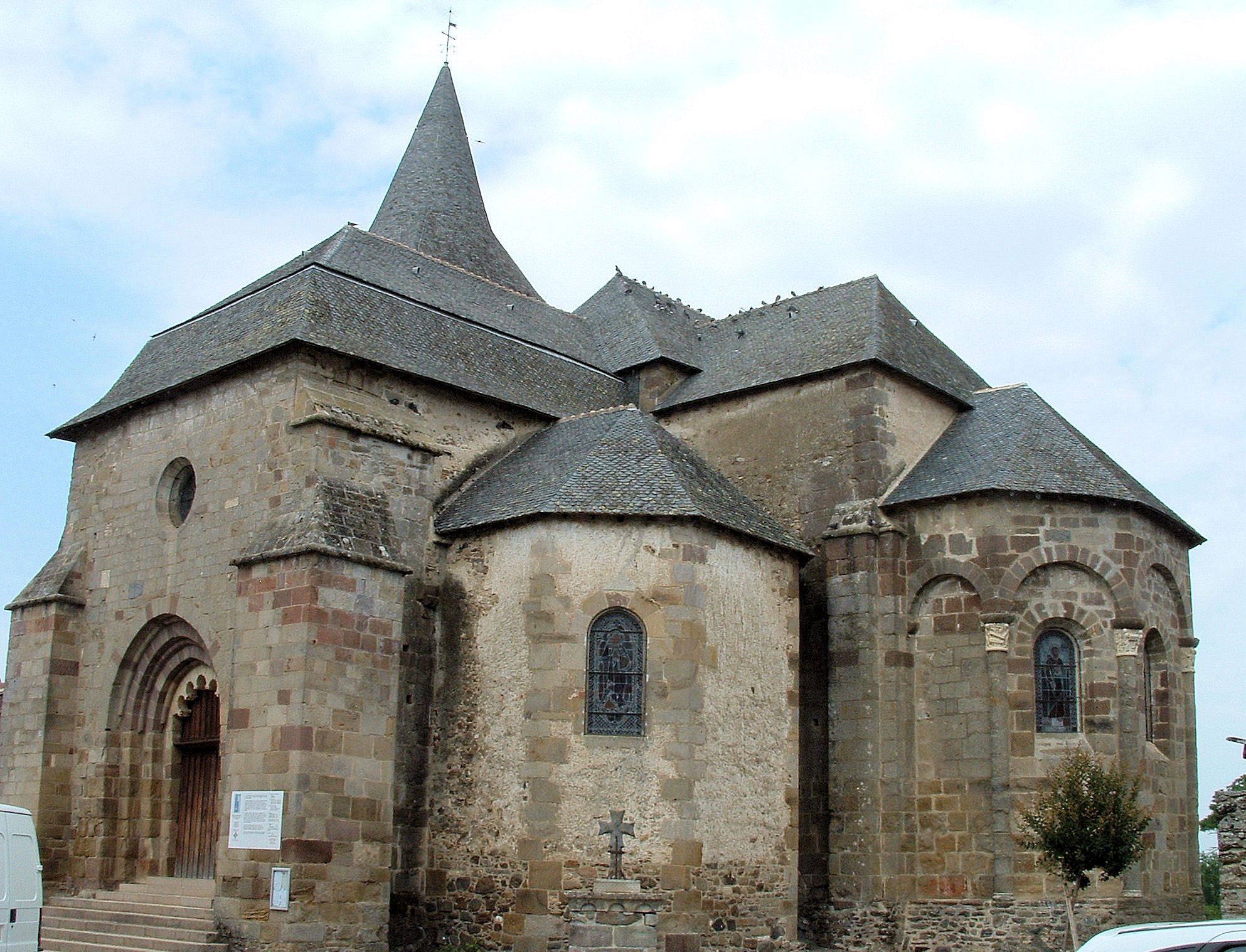 Lubersac - Eglise Saint-Etienne